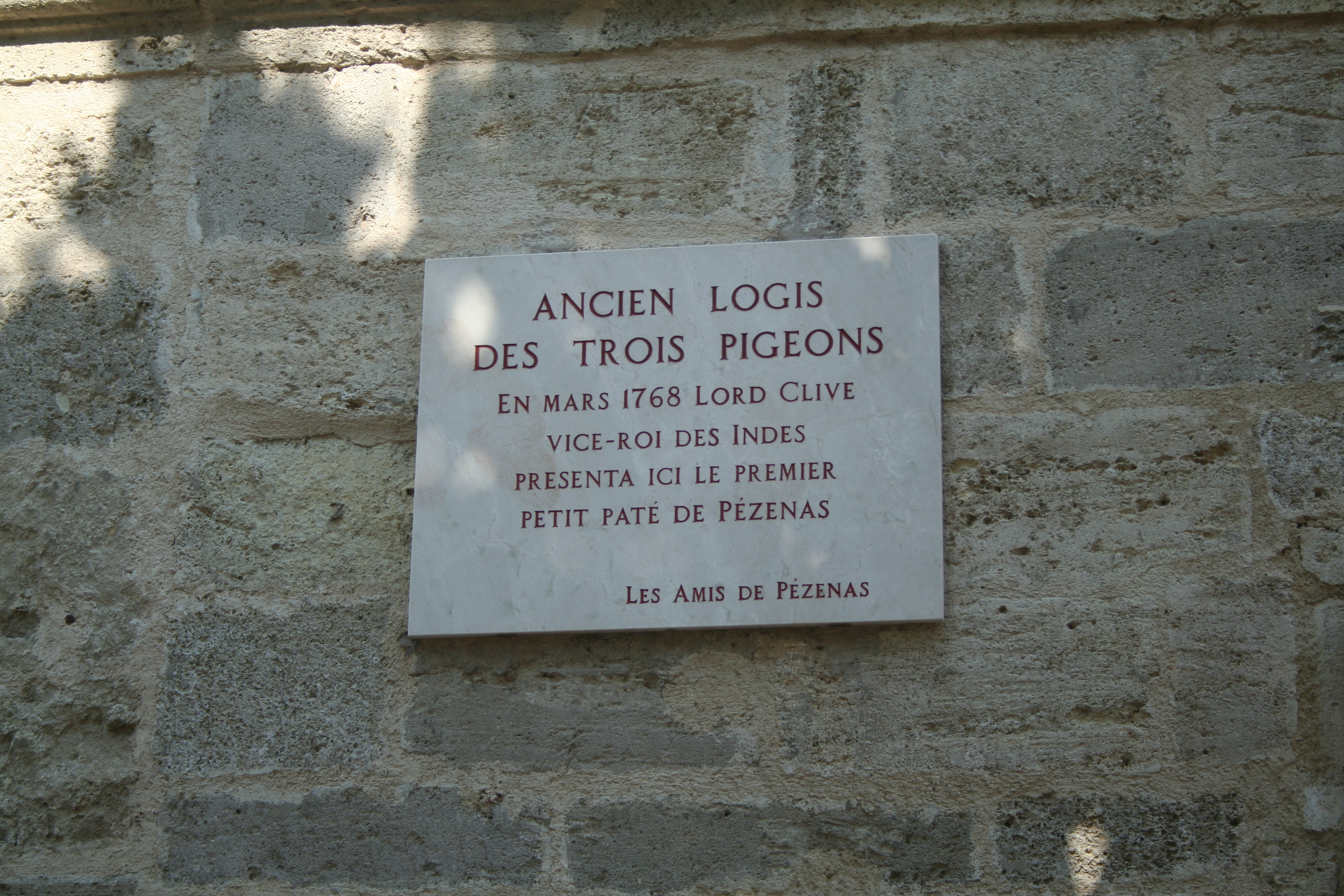 Pézenas (Hérault) - plaque sur l'ancien logis des Trois Pigeons, où a vécu Lord Clive, qui présenta le premier petit paté.